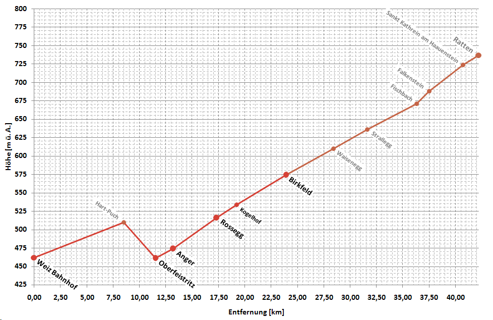 vereinfachtes Höhenprofil der Bahnstrecke Weiz-Birkfeld-Ratten